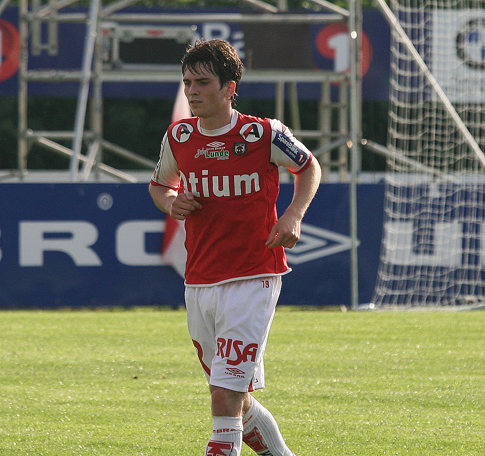 Cato Hansen